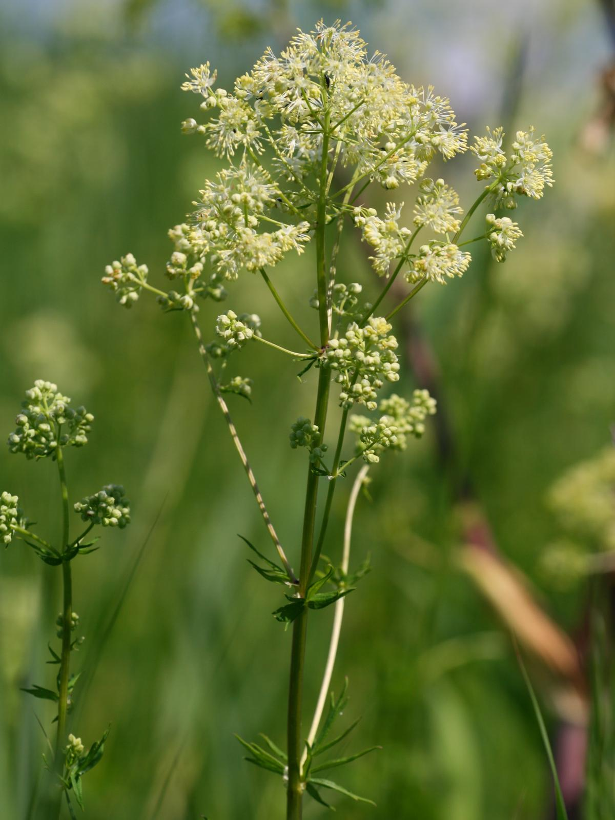 Gelbe Wiesenraute (Thalictrum flavum)